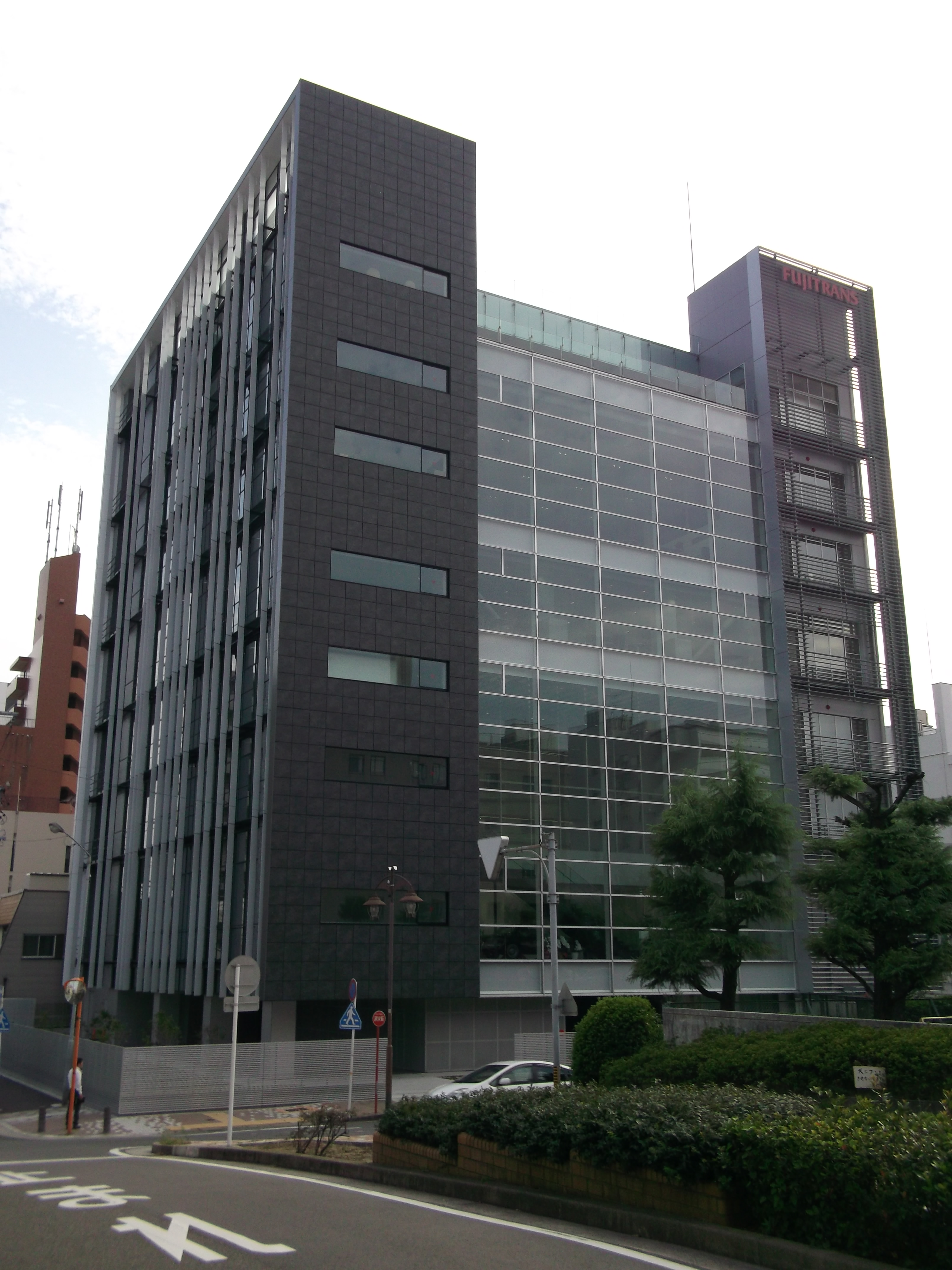 名古屋市港区入船のフジトランスコーポレーション本社を東側公道北側より撮影